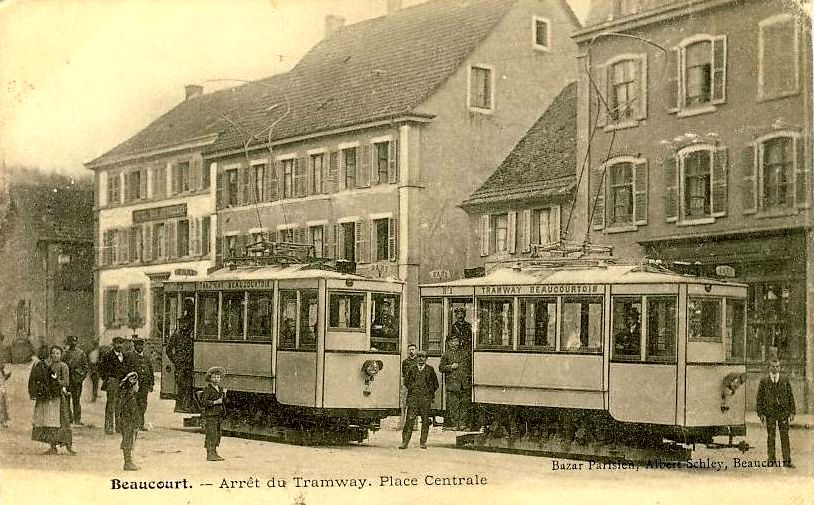 Les deux motrices du tramway Beaucourtois se croisent à l'arrêt de la place centrale.